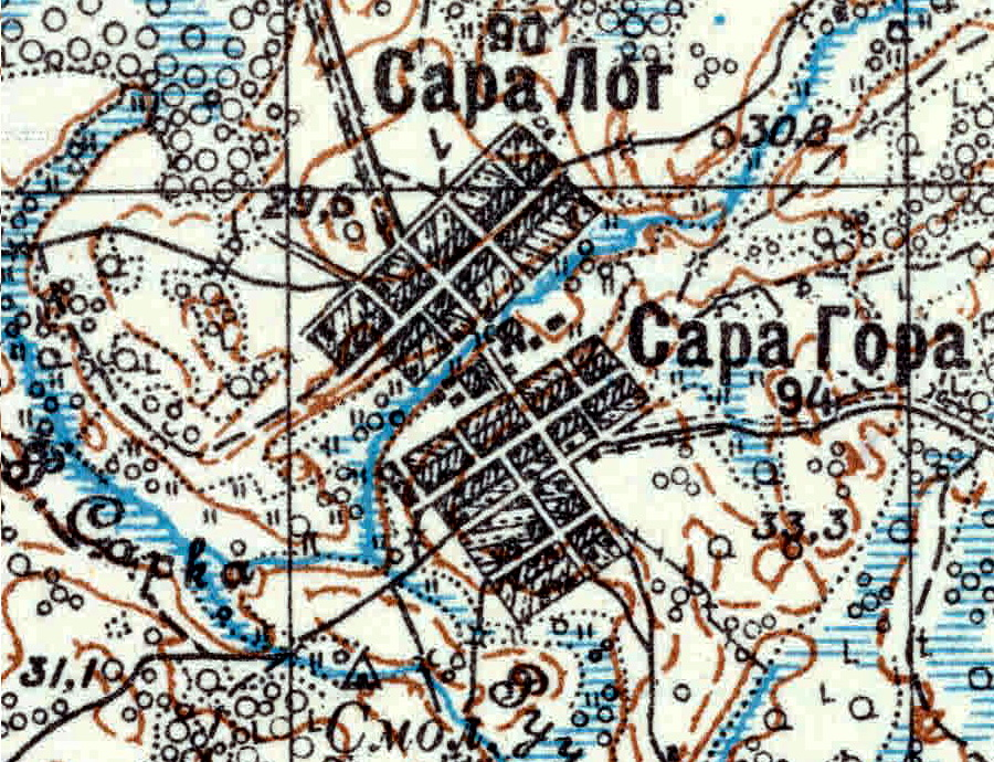 Топографическая карта Ленинградской области, квадрат VIc-27 (Залустижье), деревня Сара-Лог